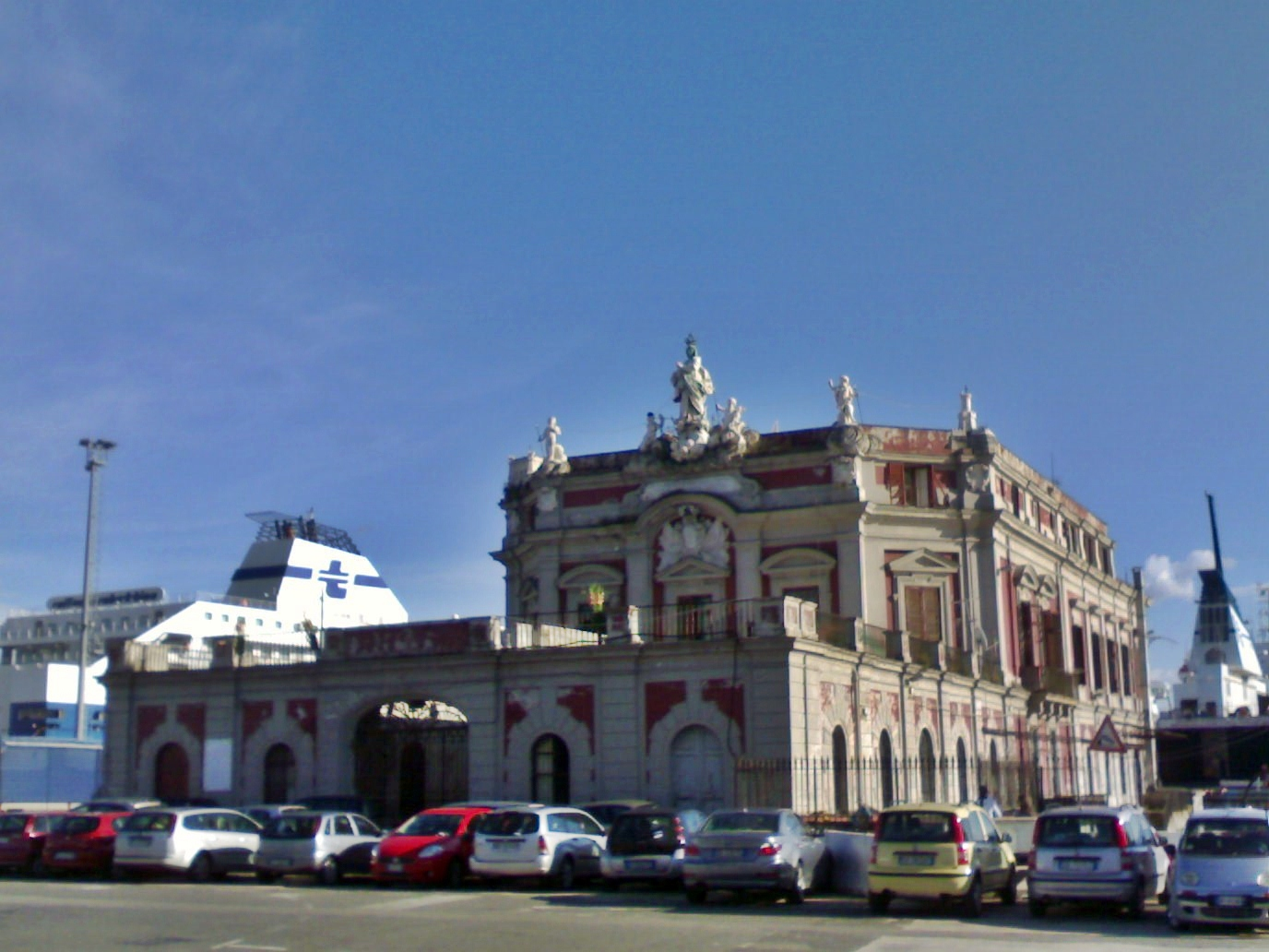 Palazzo dell'Immacolatella (Napoli)